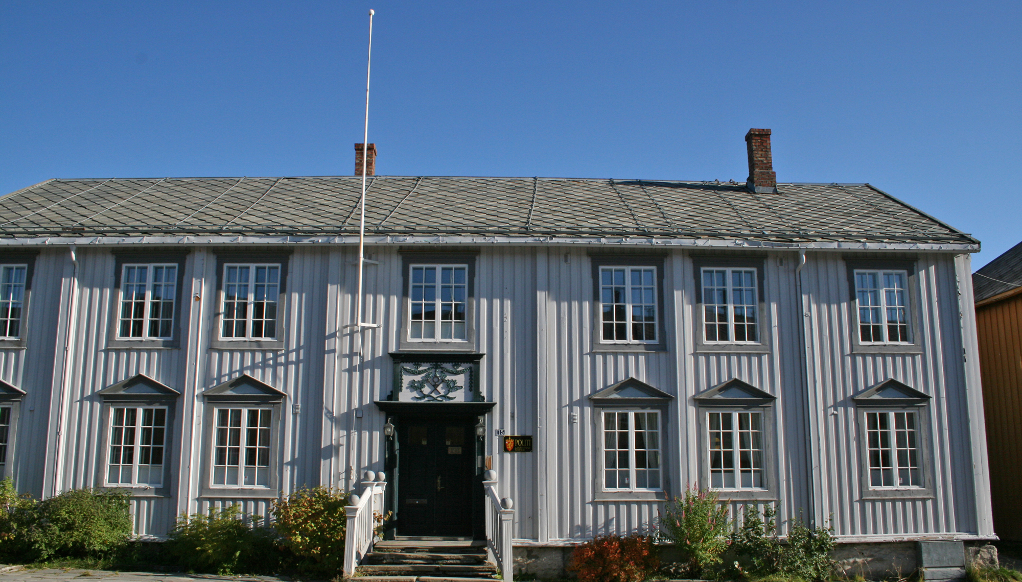 Røros Kobberverks administrasjonsbygning fra 1780-årene. Nå huser bygningen Røros lensmannskontor.